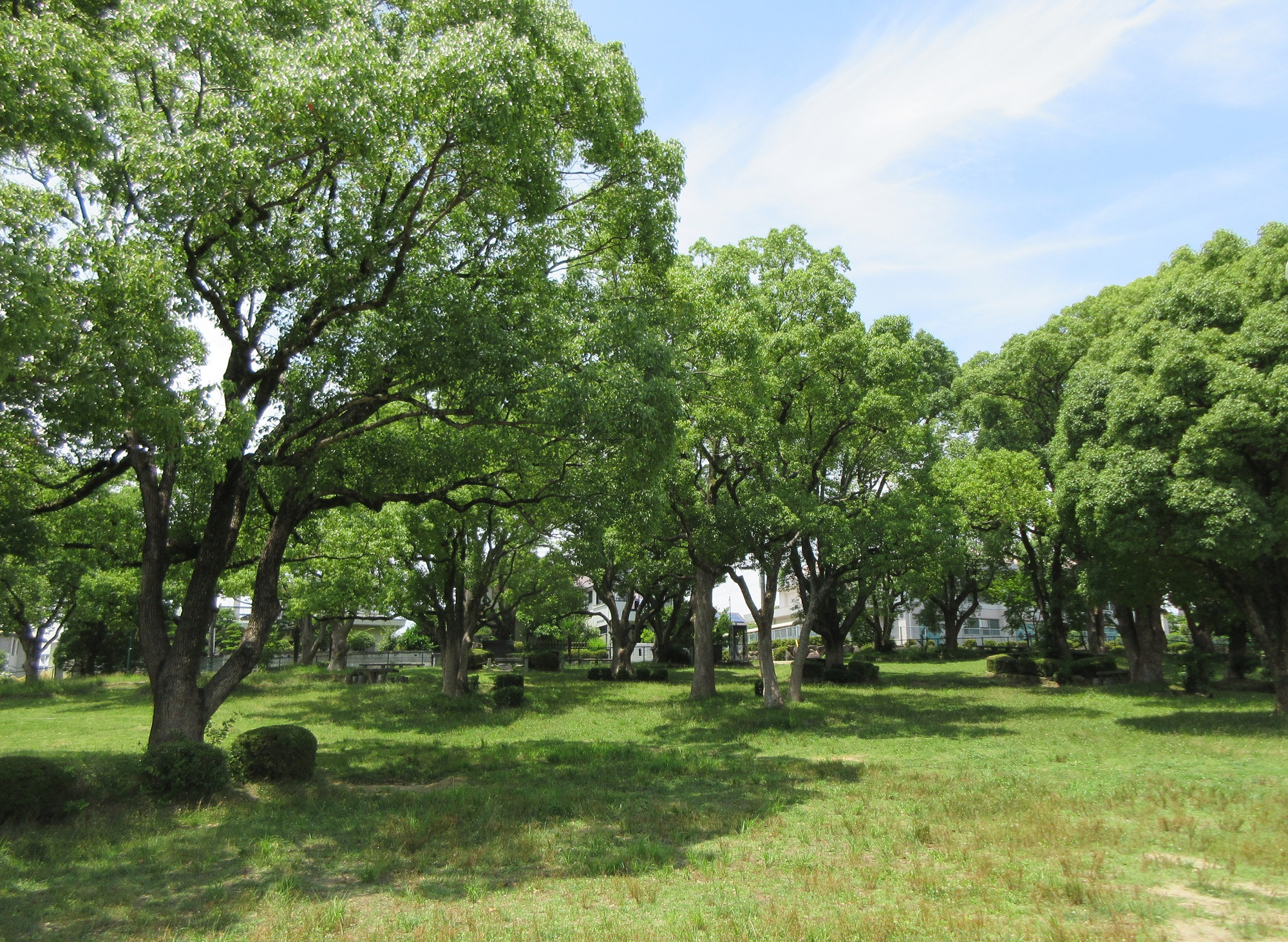 伊賀公園（岡崎市石神町）